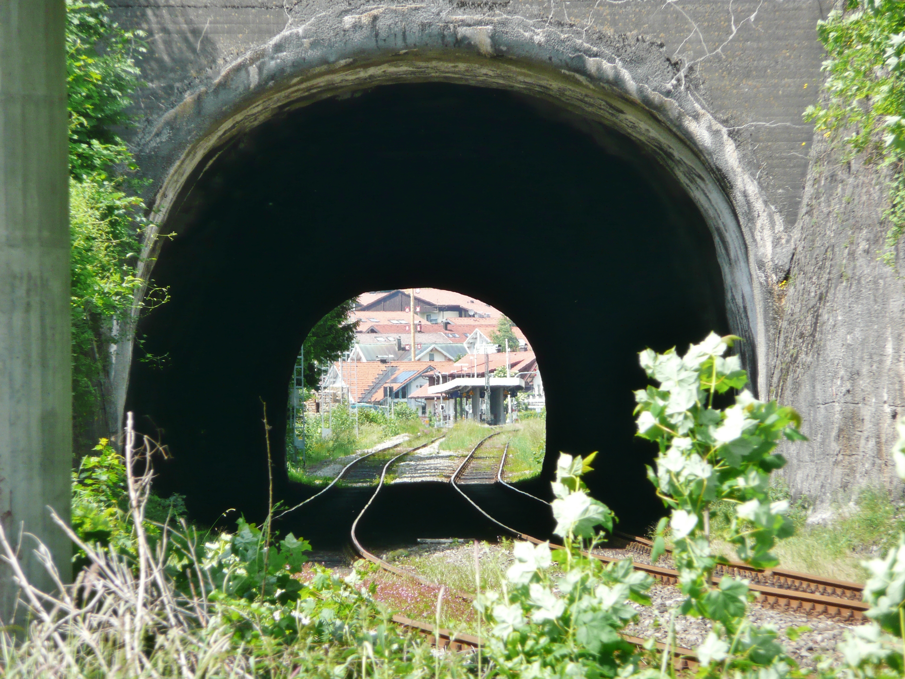 Tunnelblick zum Bahnhof Oberstaufen